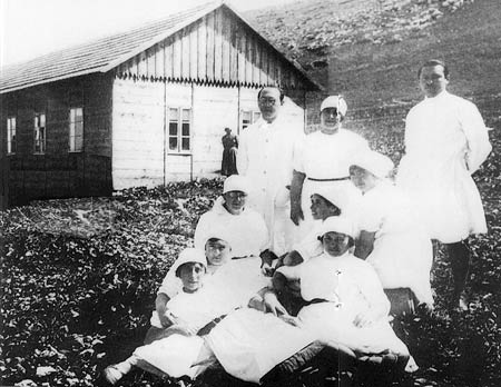 צילום של צוות הצריף הראשון בבית החולים העמק, שנת 1930